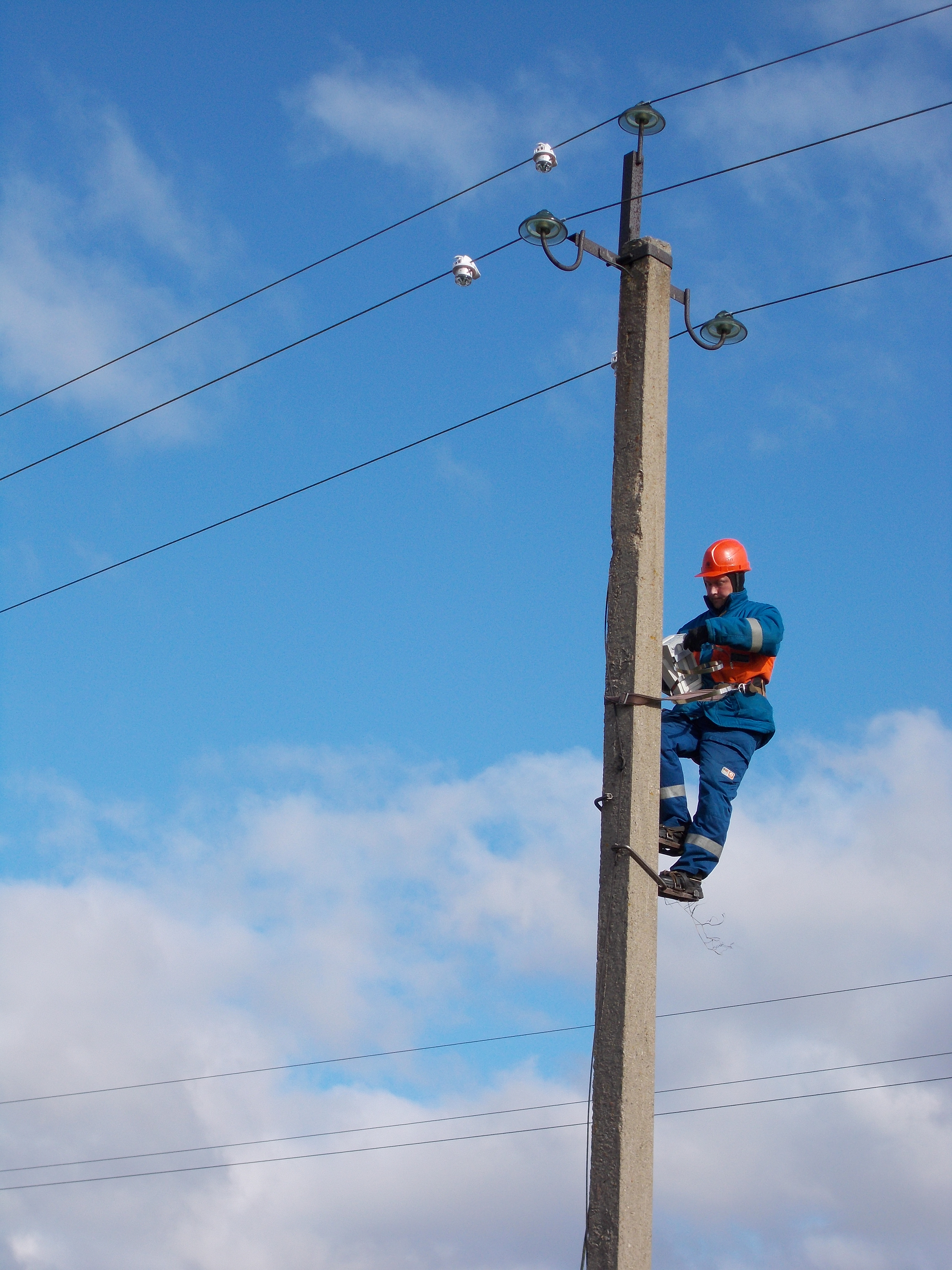 Установка УПУ с блоком передачи данный на линию электропередачи